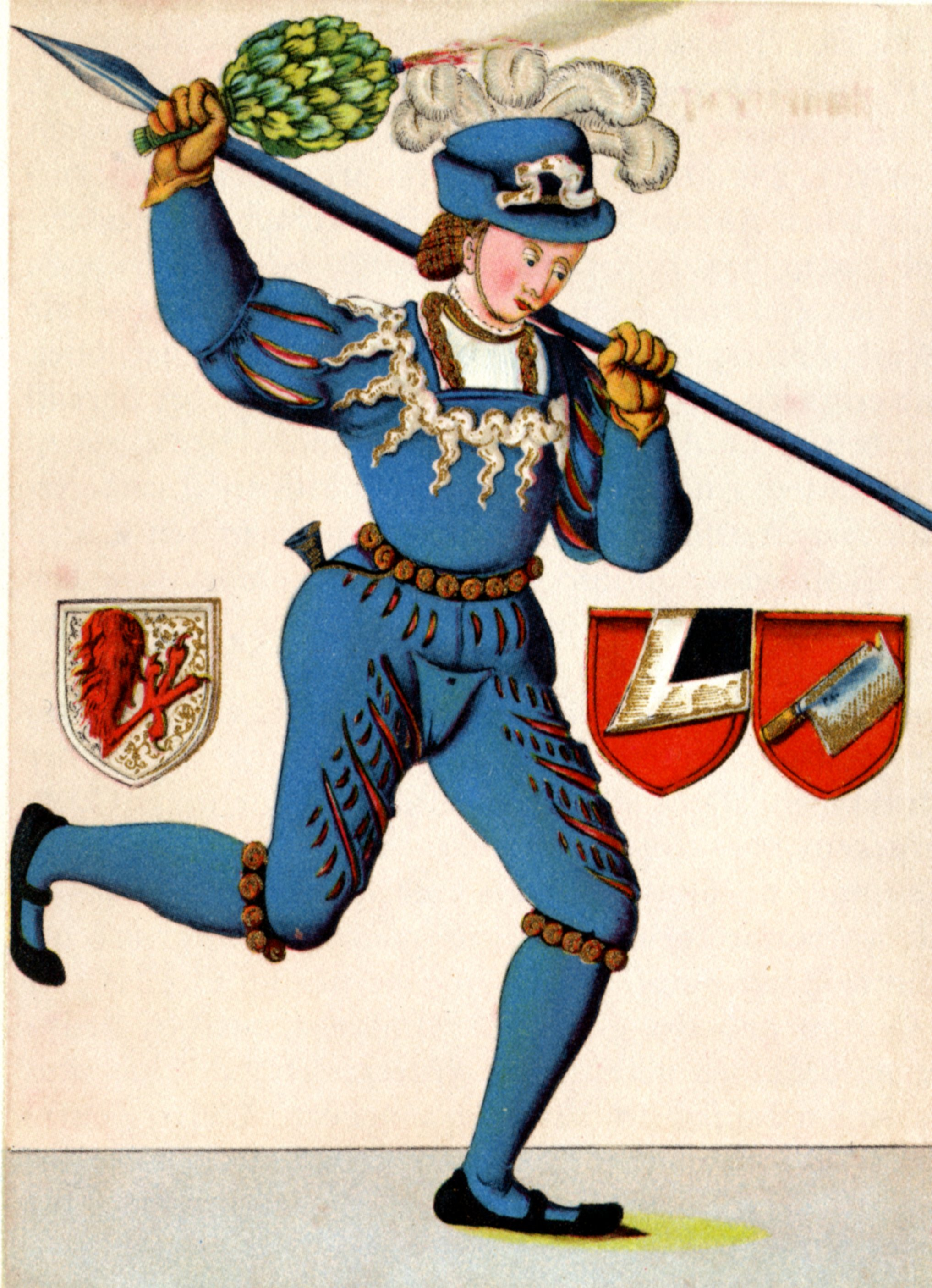 Vom Schembartlaufen. Hrsg. von Fritz Brüggemann. Leipzig: Bibliographisches Institut, 1936. Schembartläufer von 1516 in modischem Gewand. Schembartbuch der Pickertschen Sammlung. Handschrift, Nürnberger Stadtbibliothek, Nor. K. 444